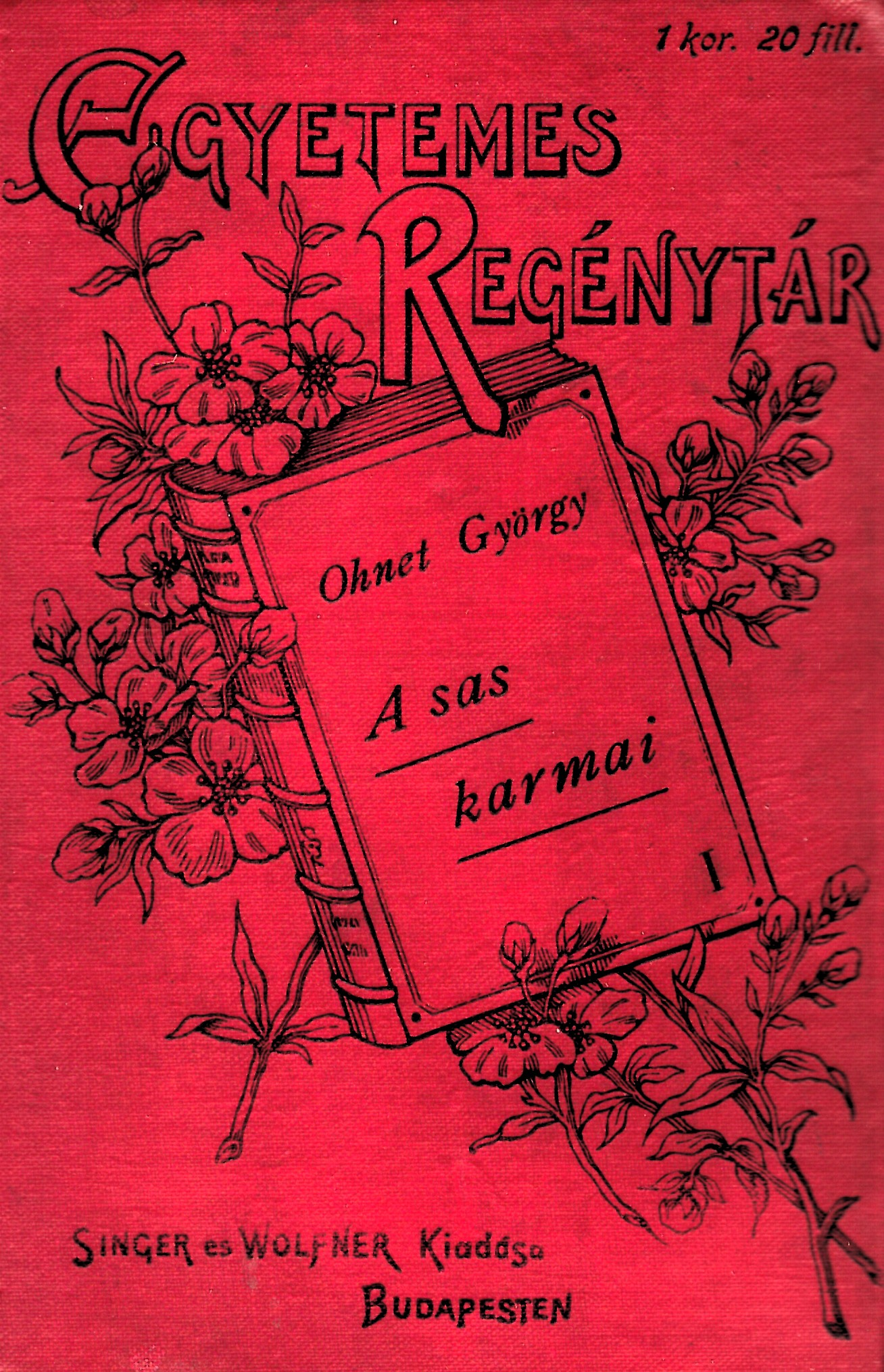 Georges Ohnet (1848-1918): A sas karmai (1913)